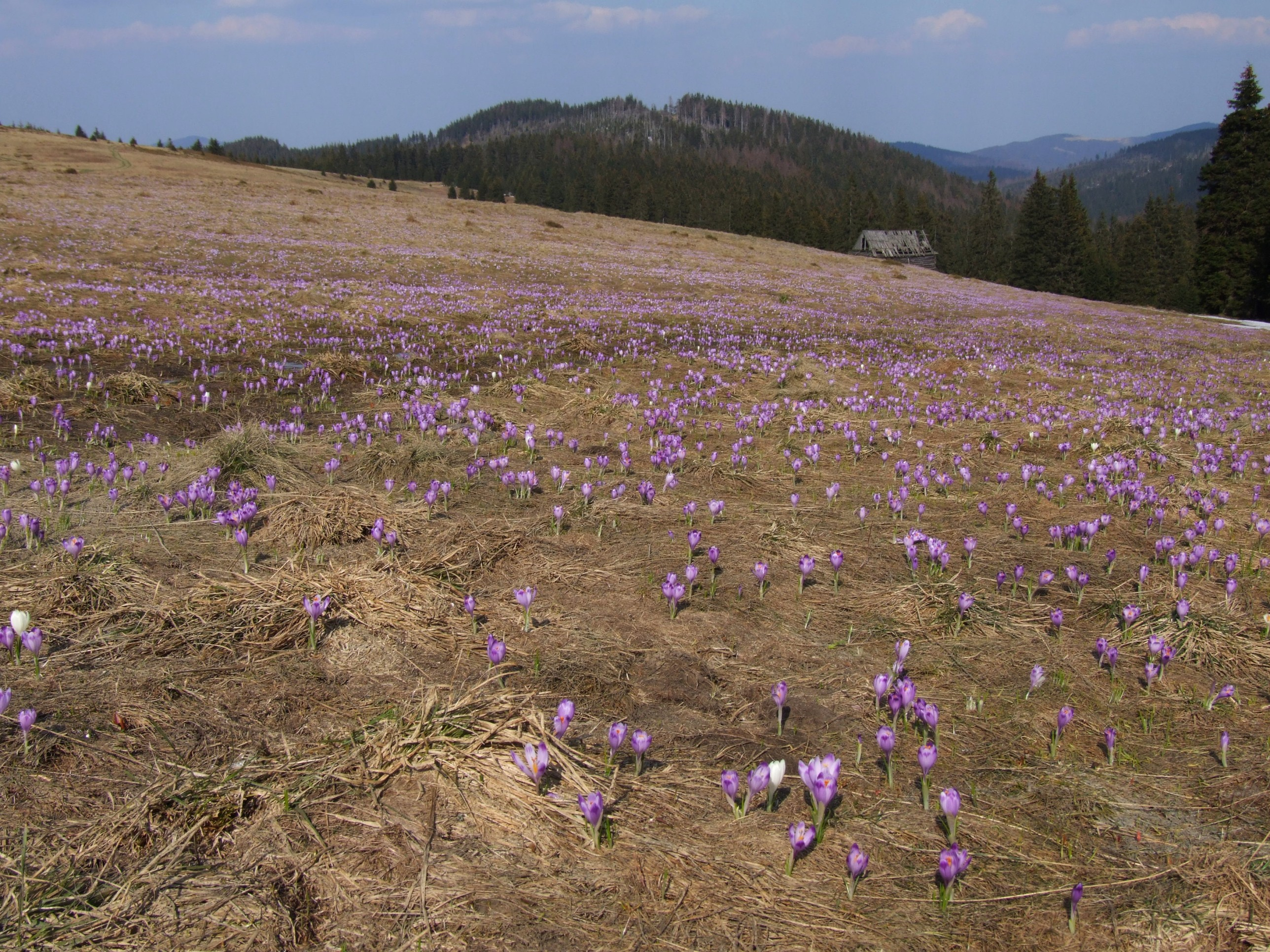 Polana Hala Turbacz(Polana Czoło Turbacza)- Gorce